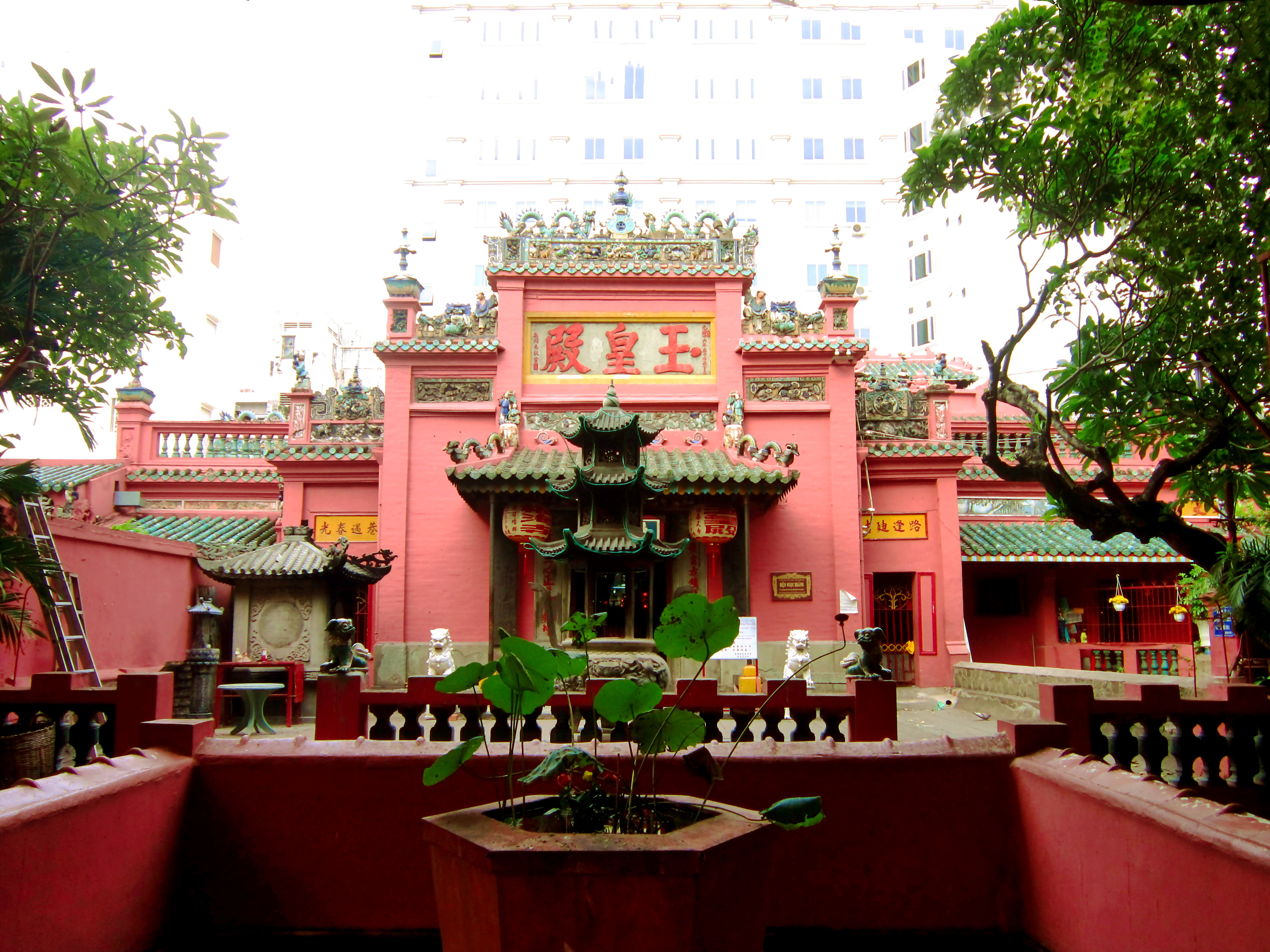 Điện Ngọc Hoàng (có khi gọi là chùa) tên chữ là Phước Hải Tự; hiện tọa lạc tại số 73 đường Mai Thị Lựu, quận 1, Thành phố Hồ Chí Minh, Việt Nam.